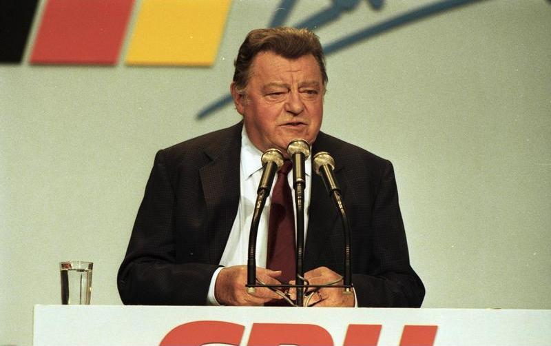 13.06. - 15.06.1988 36. CDU-Bundesparteitag in der Rhein-Main-Halle in Wiesbaden